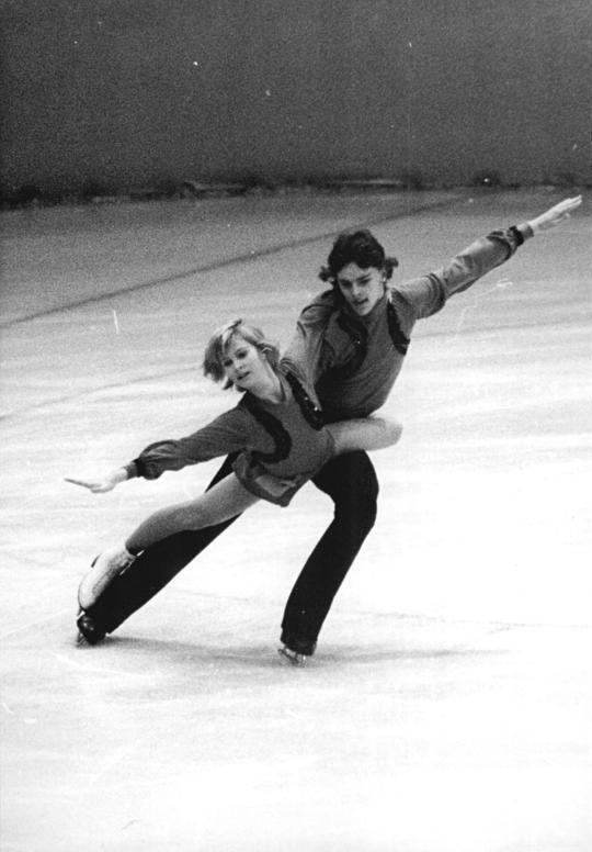 Kerstin Stolfig, Veit Kampe ADN-ZB Gahlbeck 22.12.1974 Dresden: Mit jugendlichem Elan Bronzemedaille erkämpft.- Viel Beifall erhielten von den Zuschauern die erst 14jährige Kerstin Stolfig und ihr 19jähriger Partner Veit Kampe (SC Dynamo Berlin) für ihren ausgezeichneten Kürvortrag der Paarlaufkonkurrenz am 21.12.1974. In ihrer zweiten gemeinsamen Saison konnten sie bei den DDR-Meisterschaften im Eiskunstlaufen bereits eine Bronzenmedaille erringen. Nun haben sie die Chance, die DDR als drittes Paar bei den Europameisterschaften zu vertreten.